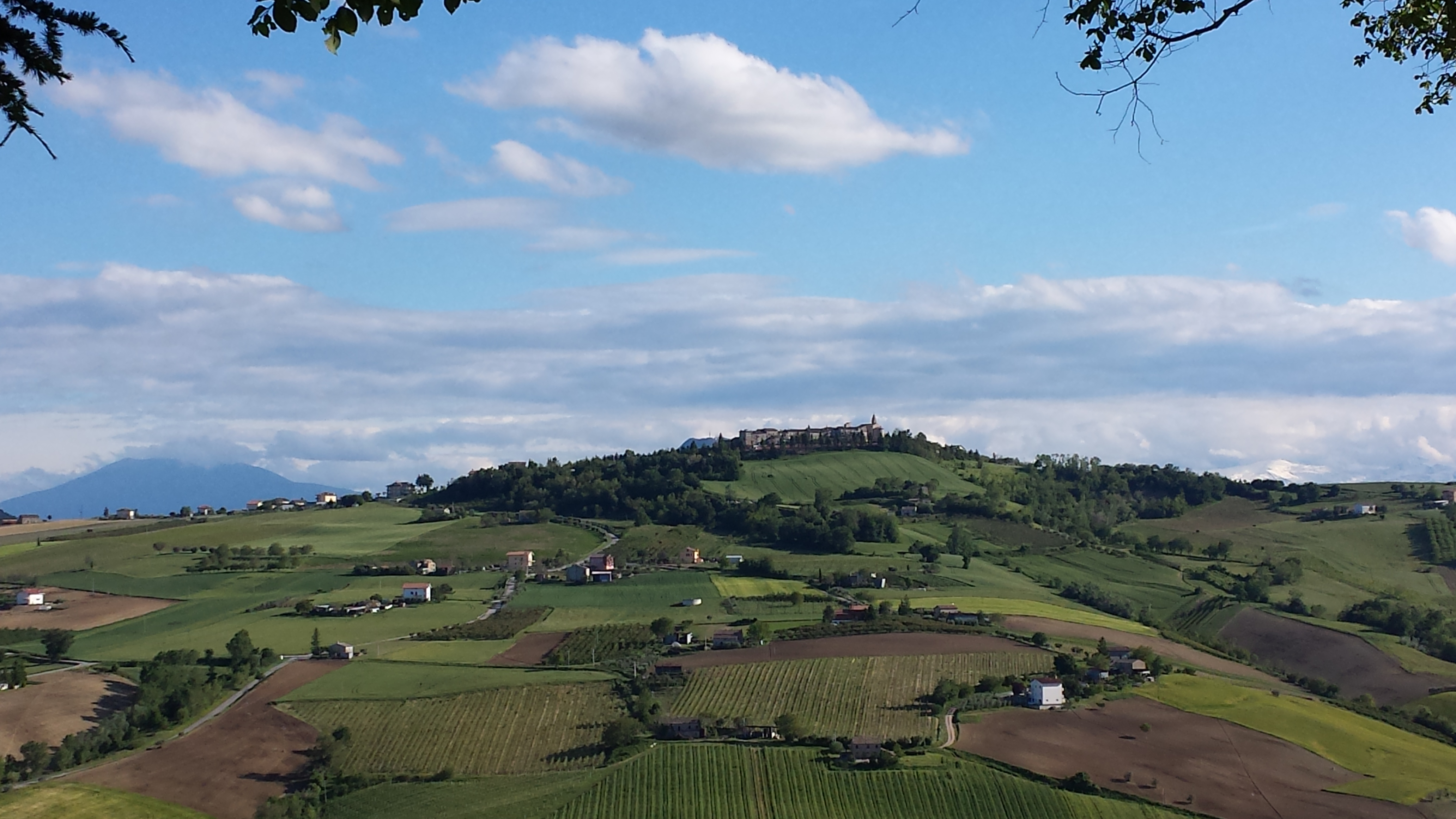 Monte Rinaldo Paesaggio